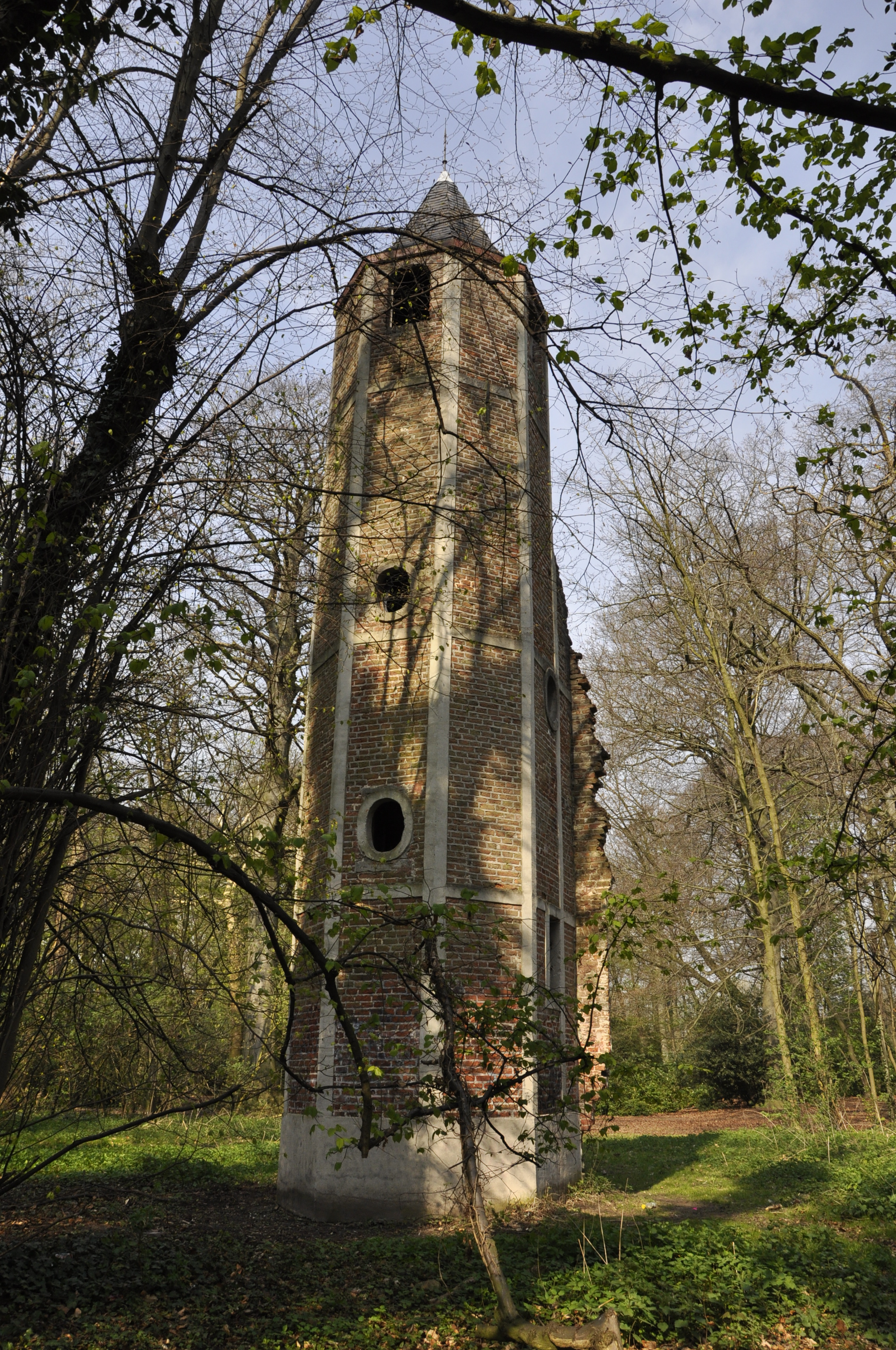 Toren van het voormalige kasteel Vilain in het Rattendaelepark te Gentbrugge, België